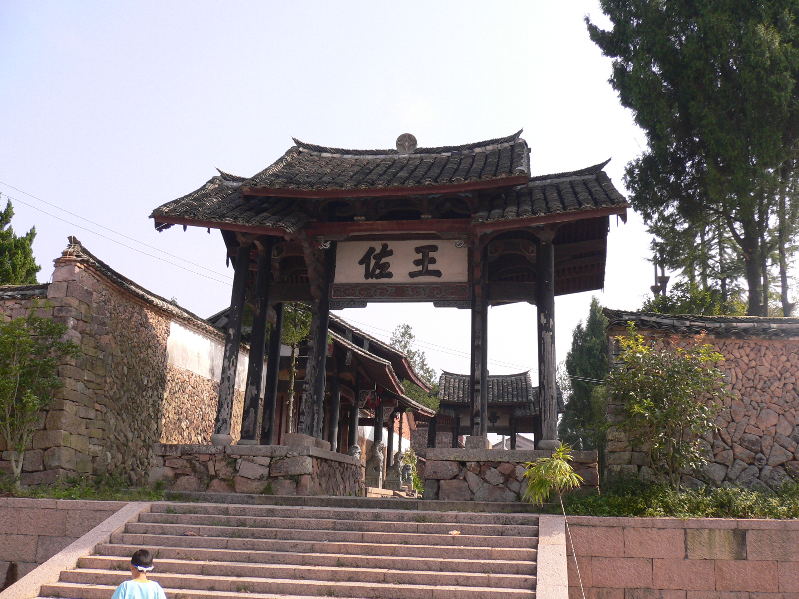 刘基庙的王佐牌坊